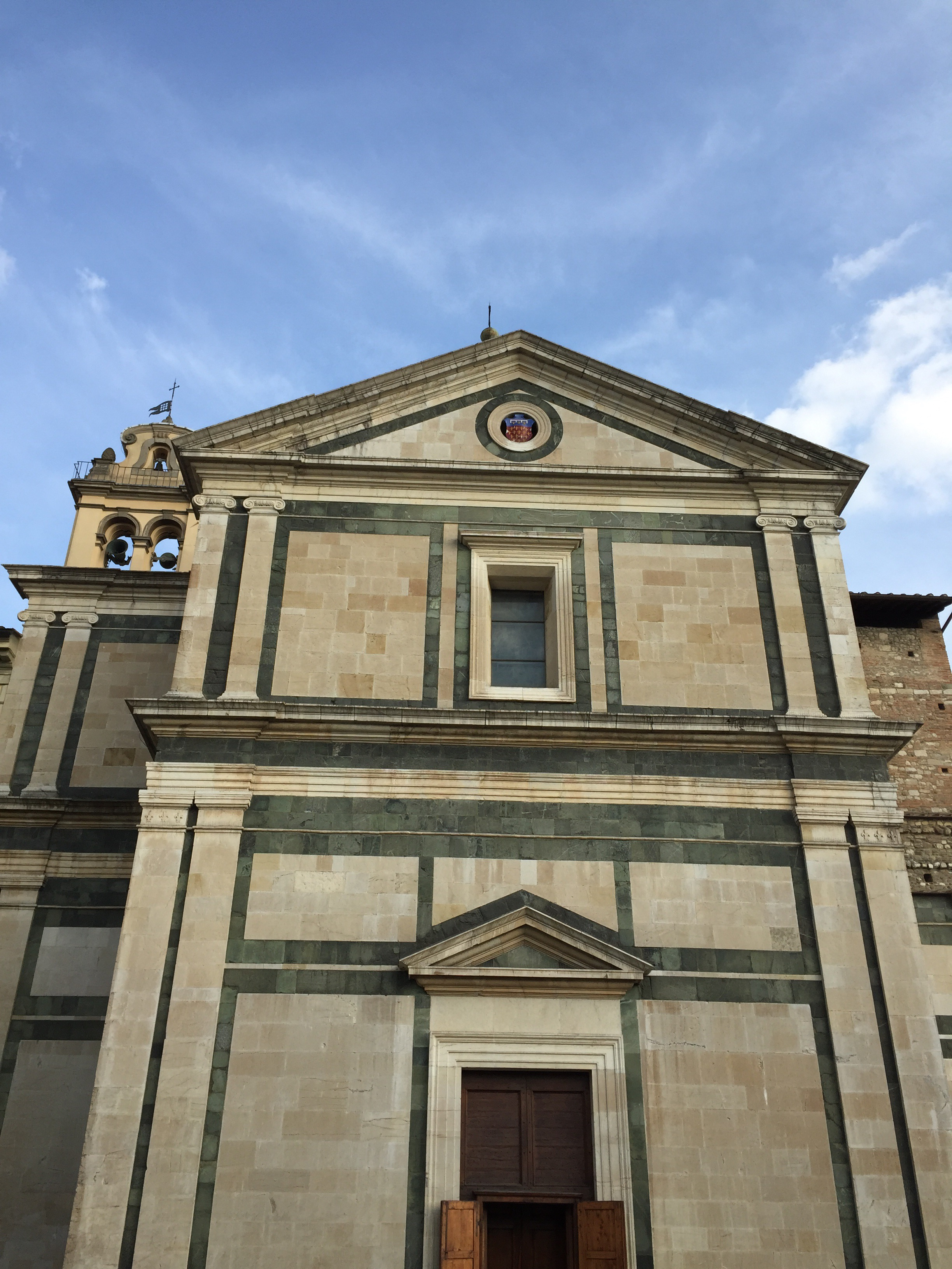 Chiesa di s Maria delle carceri a Prato